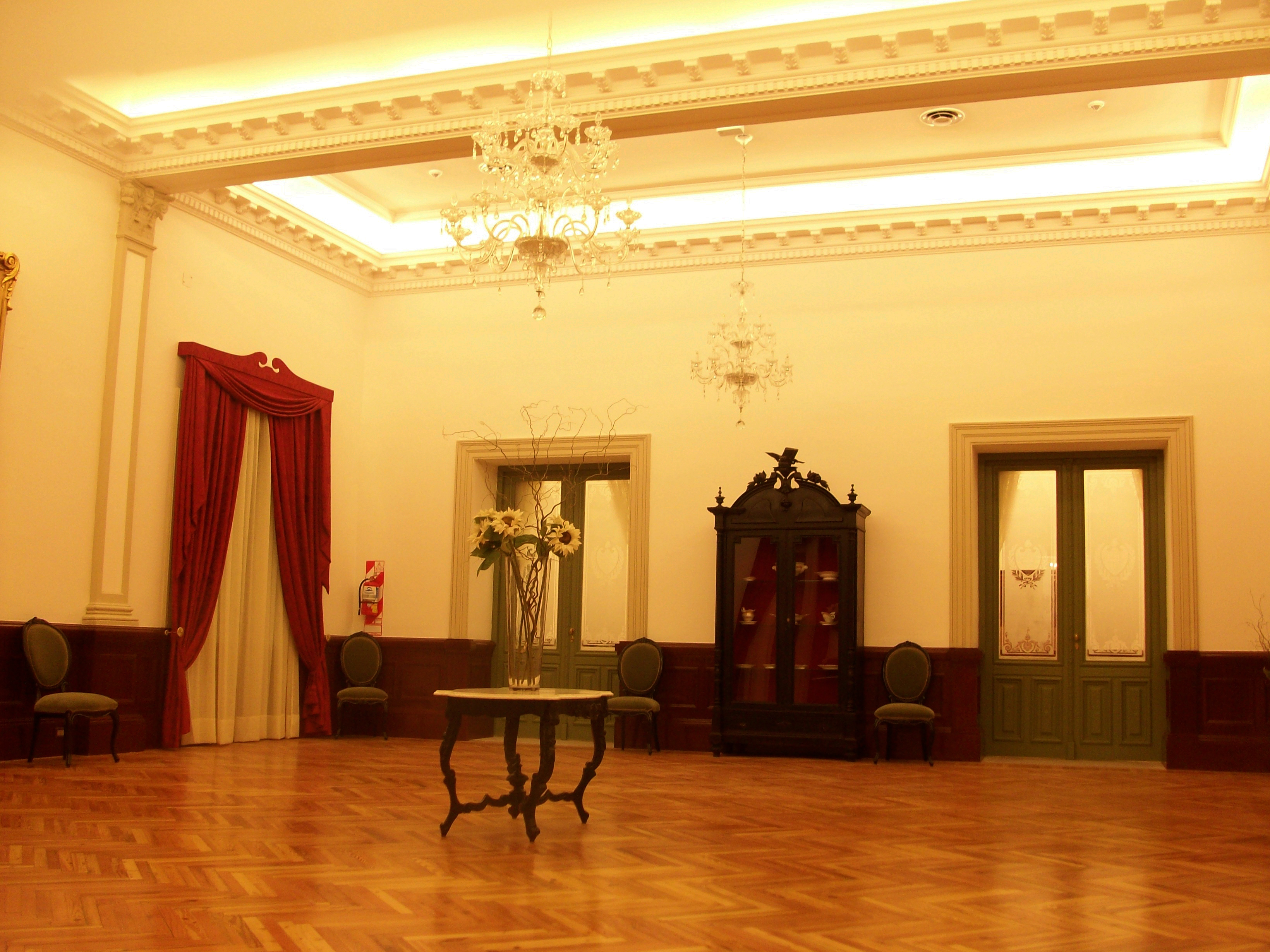 Salón Protocolar del edificio histórico donde se sitúa el Centro Cultural del Bicentenario de Santiago del Estero, Argentina.